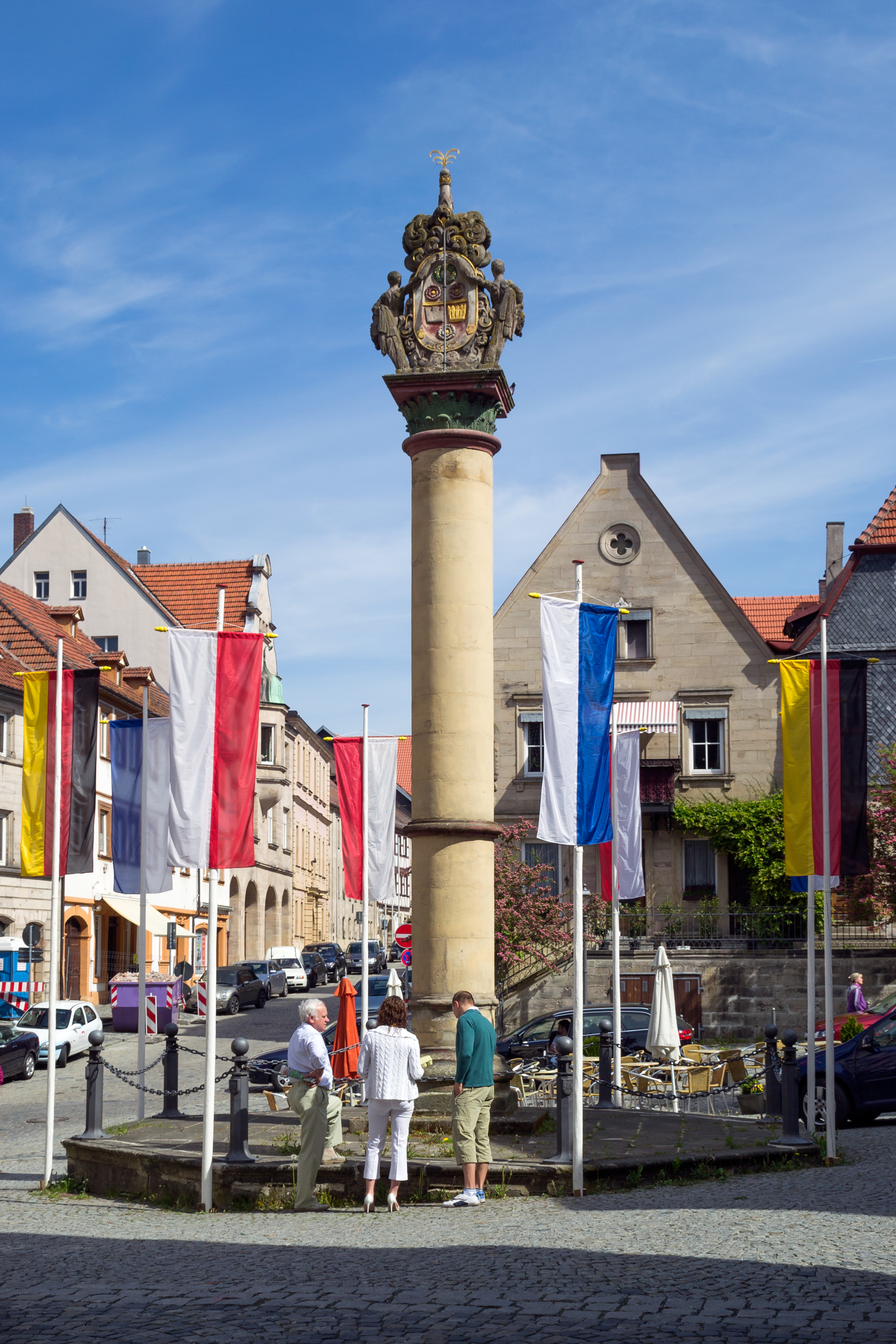 Ehrensäule auf dem Melchior-Otto-Platz in Kronach